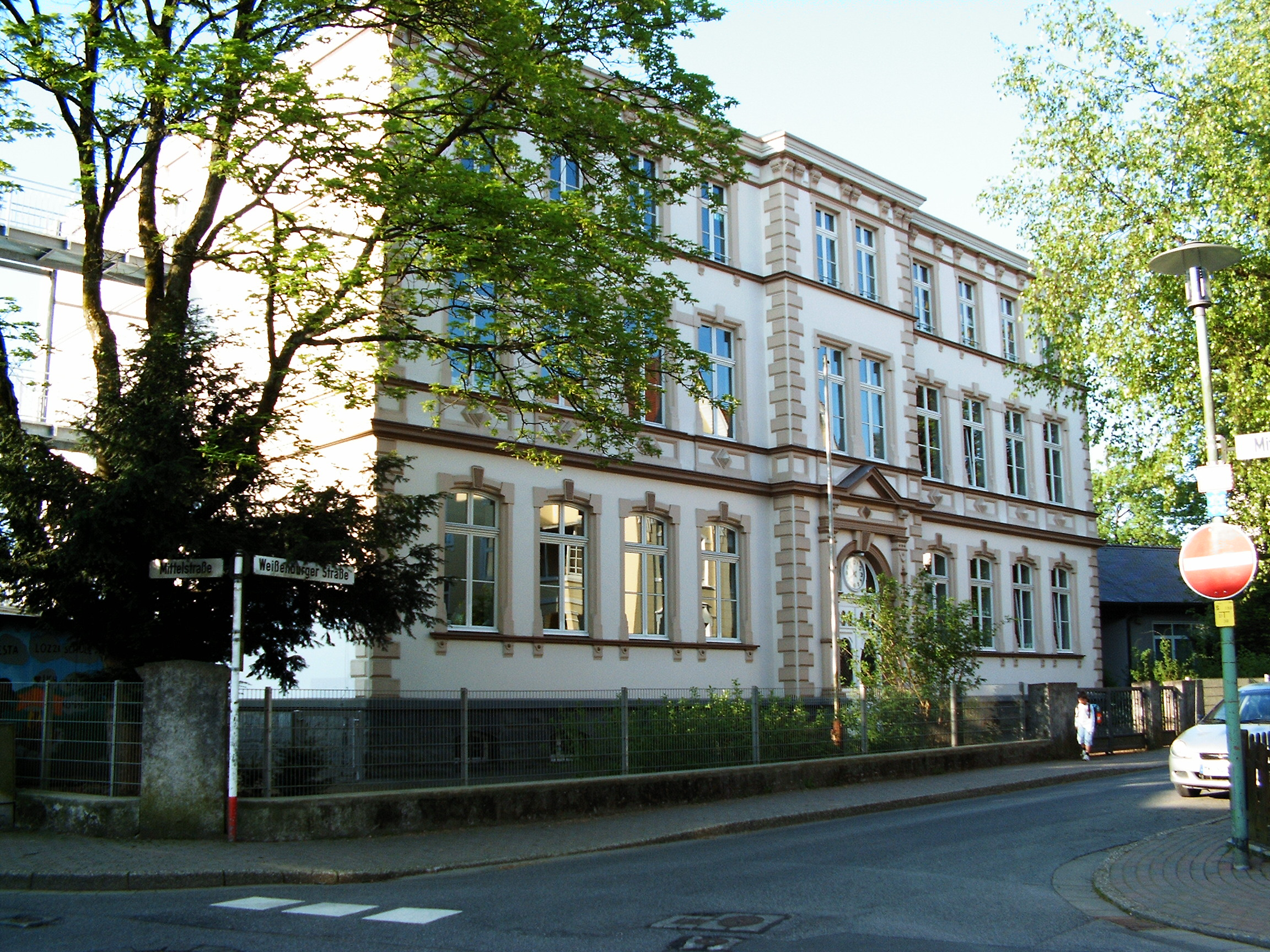 Gemeinschaftsgrundschule Pestalozzi in Lüdenscheid